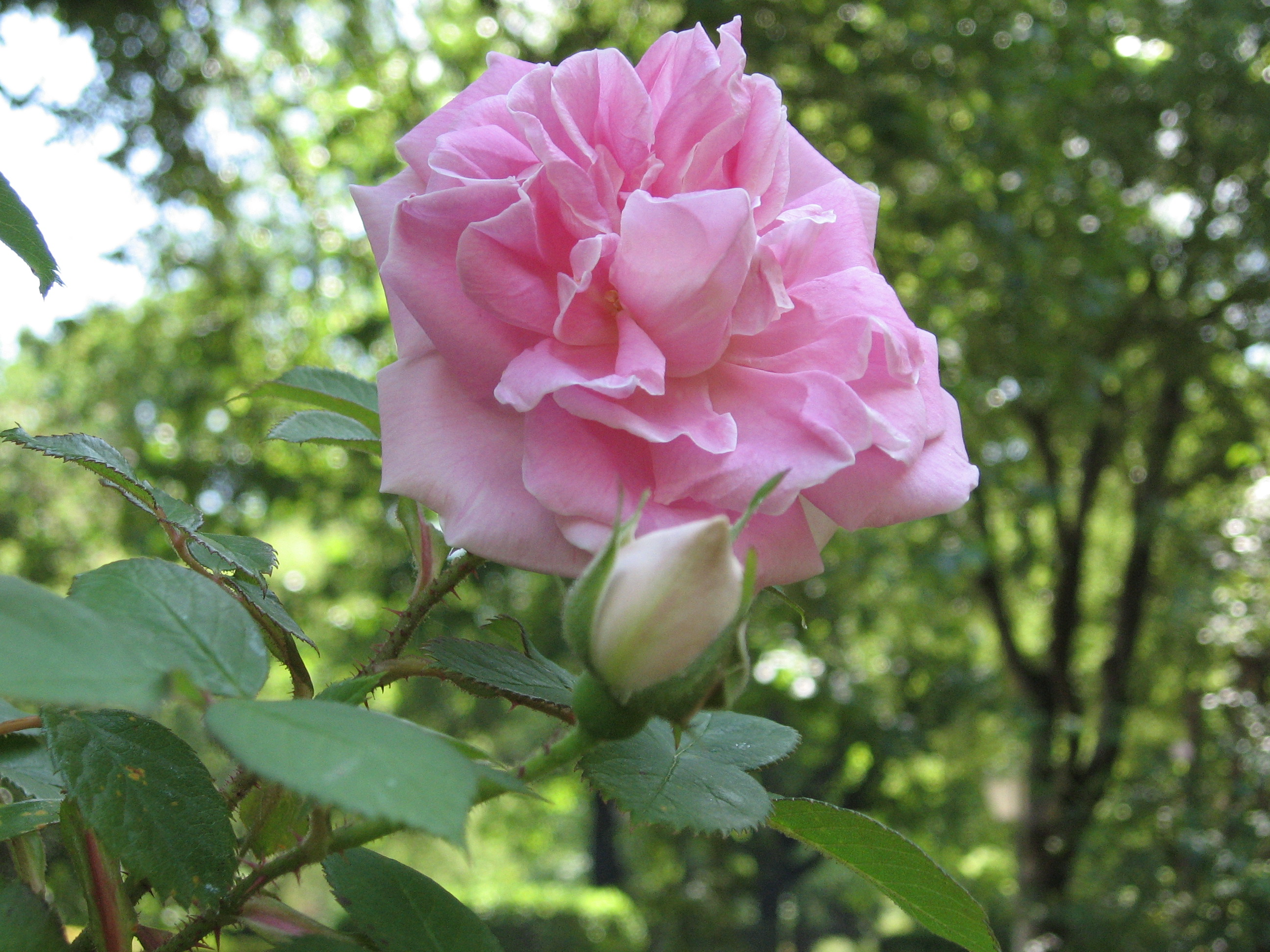 Rosa 'Conrad Ferdinand Meyer'. Real Jardín Botánico de Madrid.